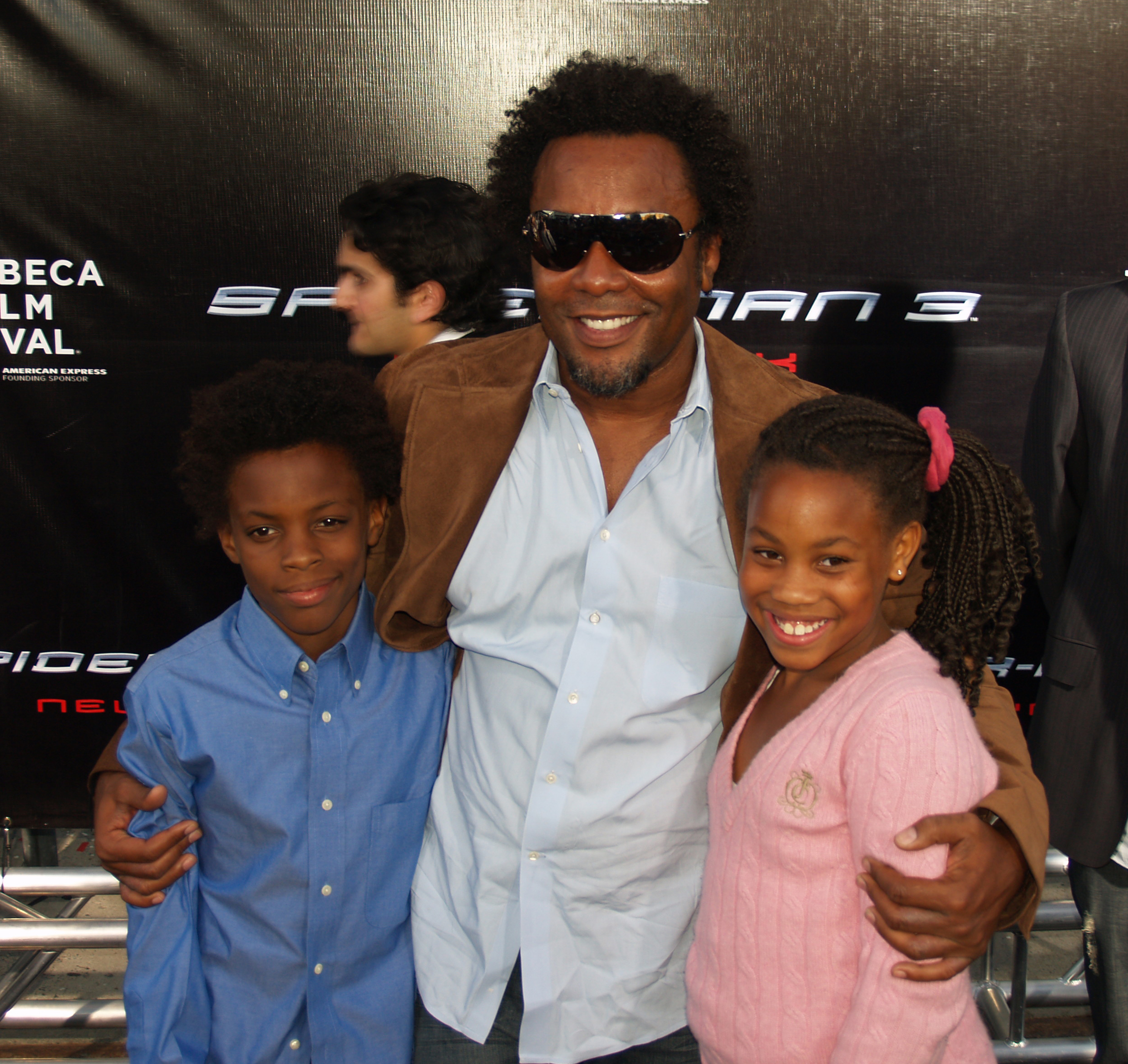 Lee Daniels and children